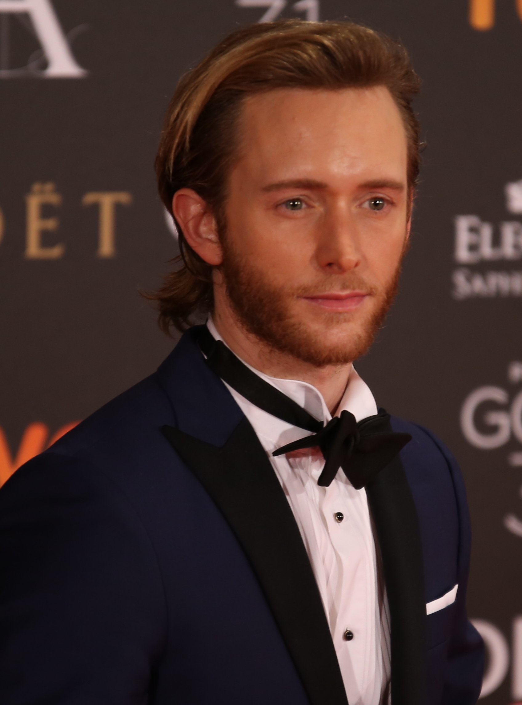 Premios Goya 2017